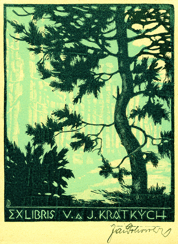 Jaroslav Dobrovolský: Exlibris pro V. a J. Krátkých, 1932, barevný dřevoryt